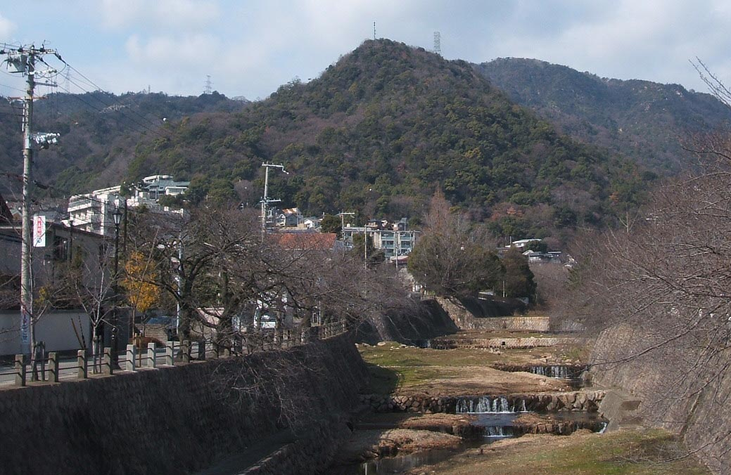 鷹尾城（山城）